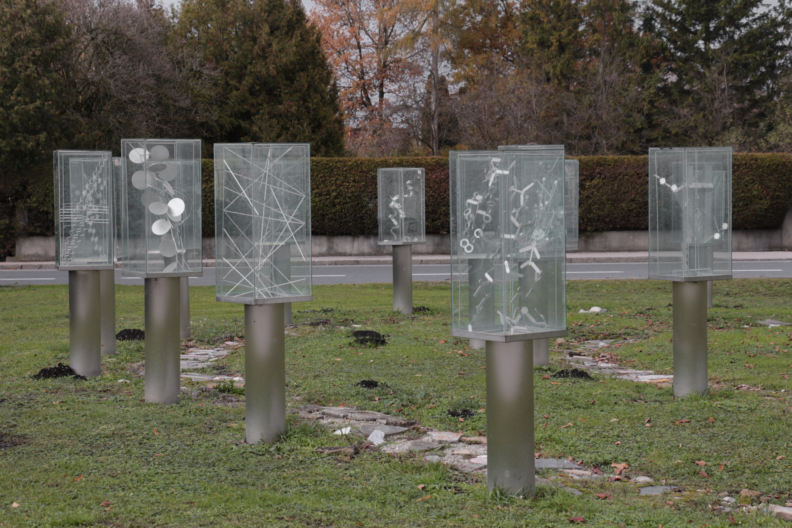 Der sogenannte Miele Skulpturenpark in Bürmoos, Bezirk Salzburg-Umgebung im Jahr 2013, etwa ein Jahr vor seiner Entfernung